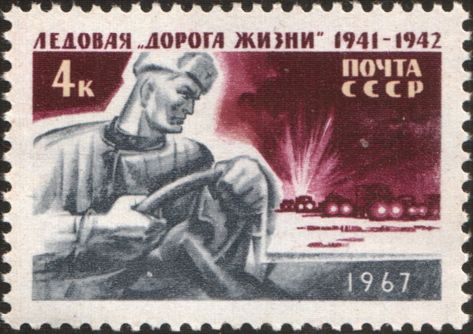 Ледовая "Дорога жизни" (1941-1942) в период блокады Ленинграда. Художник: А. Шмидштейн. Марка СССР, номинал - 4коп.